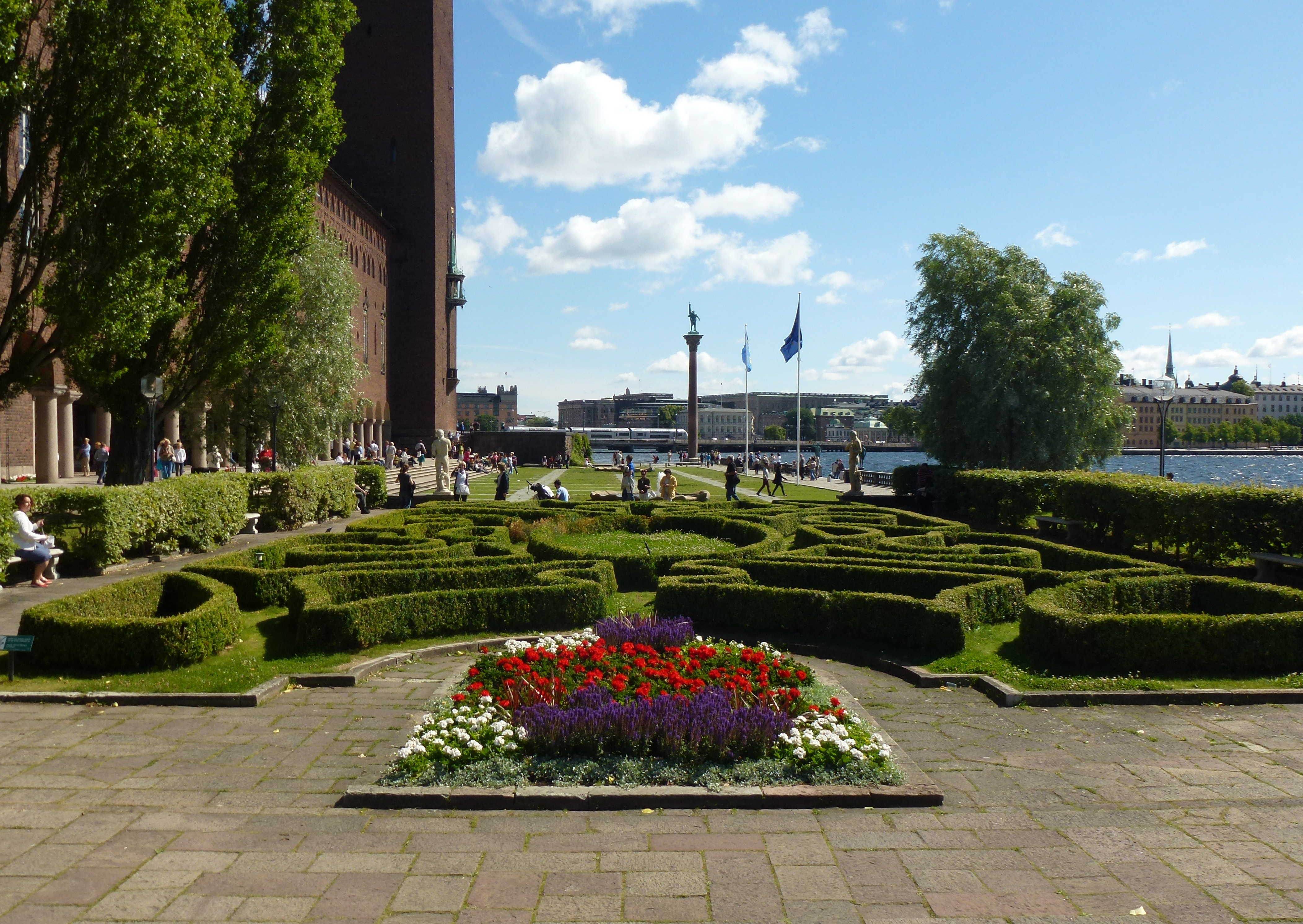 Stadshuset trädgården